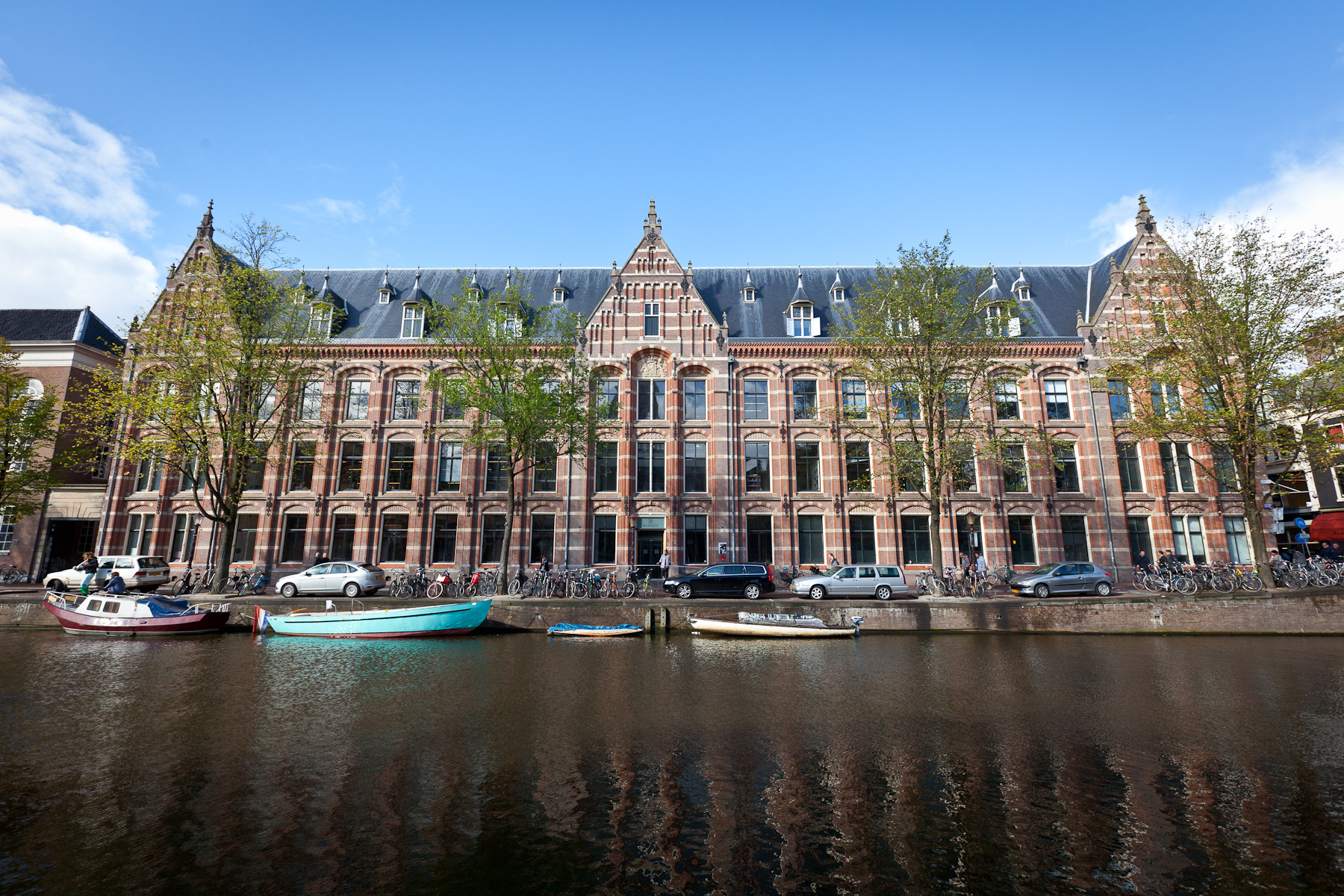 Amsterdam